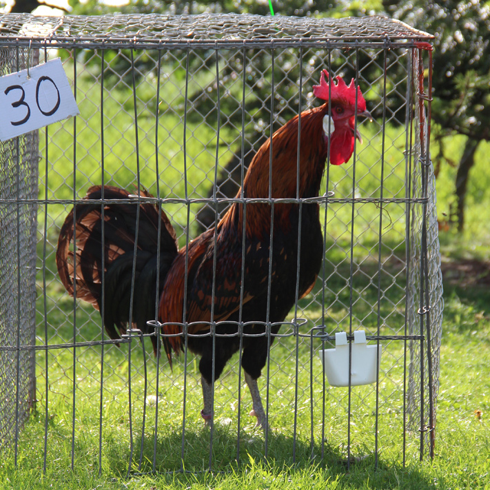 Bergse kraaier bij een hanenkraaiwedstrijd